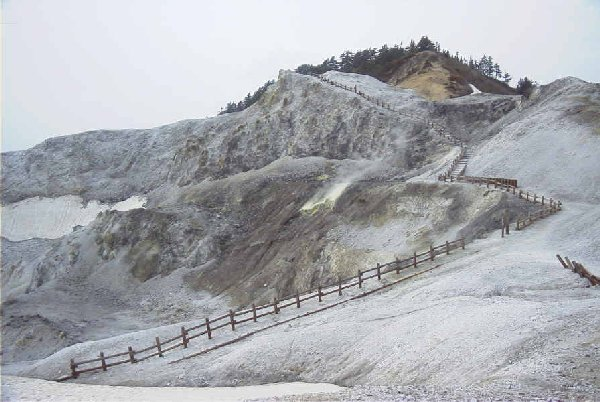 Kawarake Jigoku in Akita Pref.,Japan